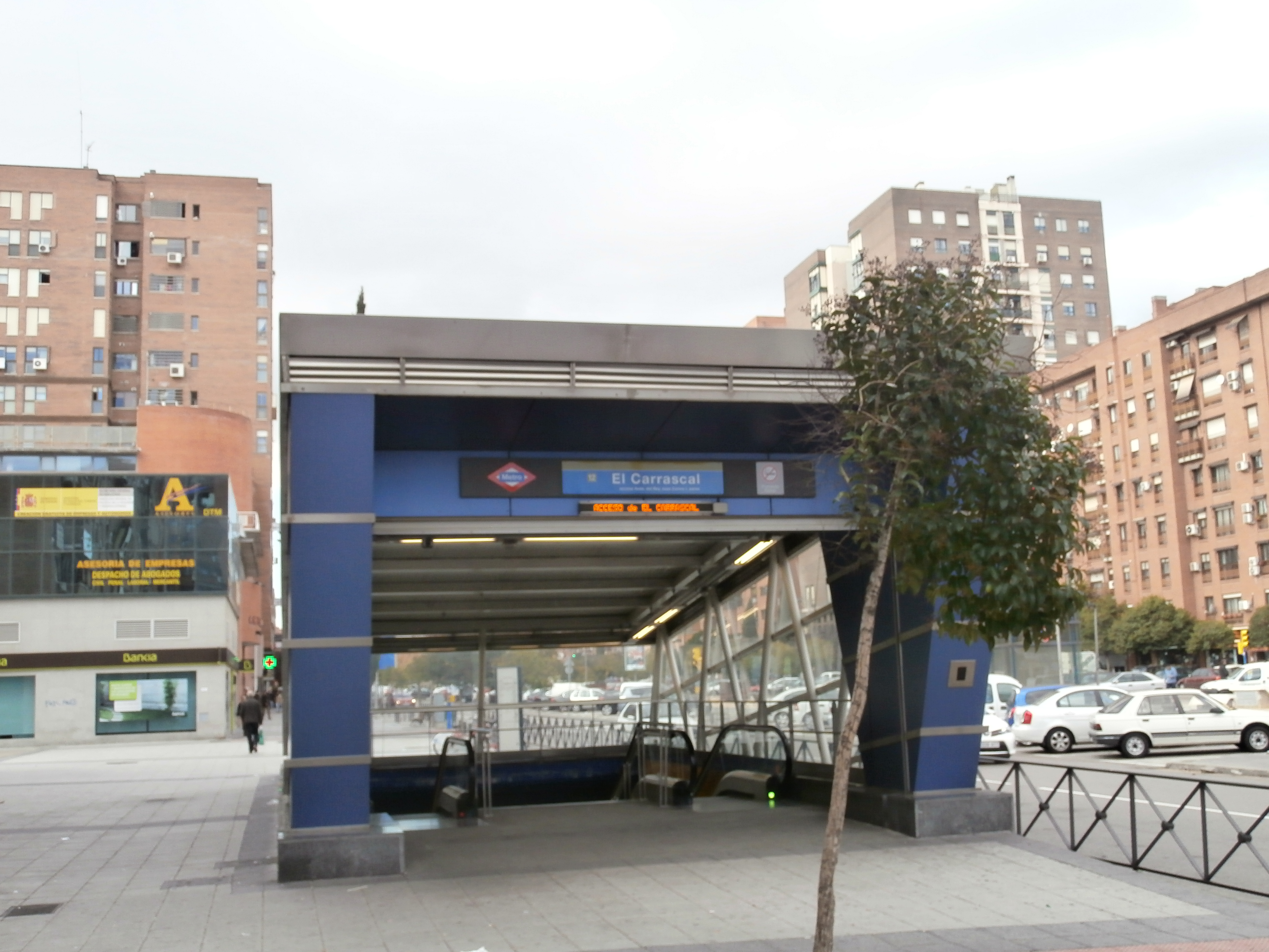 Boca de acceso de la estación de El Carrascal en Leganés.